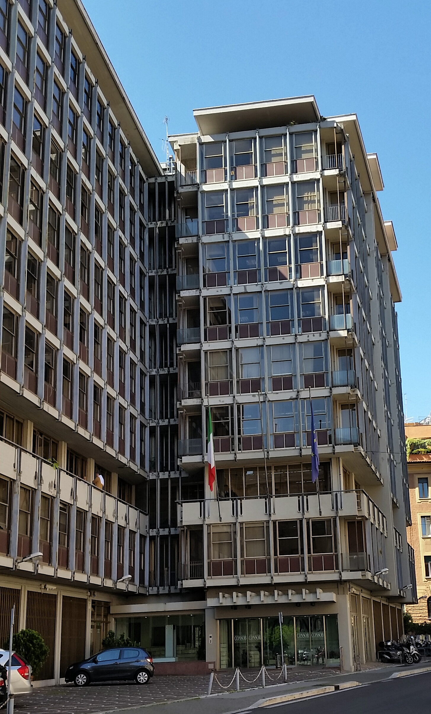 Sede della CONSOB a Via Giovanni Battista Martini, 3, Roma